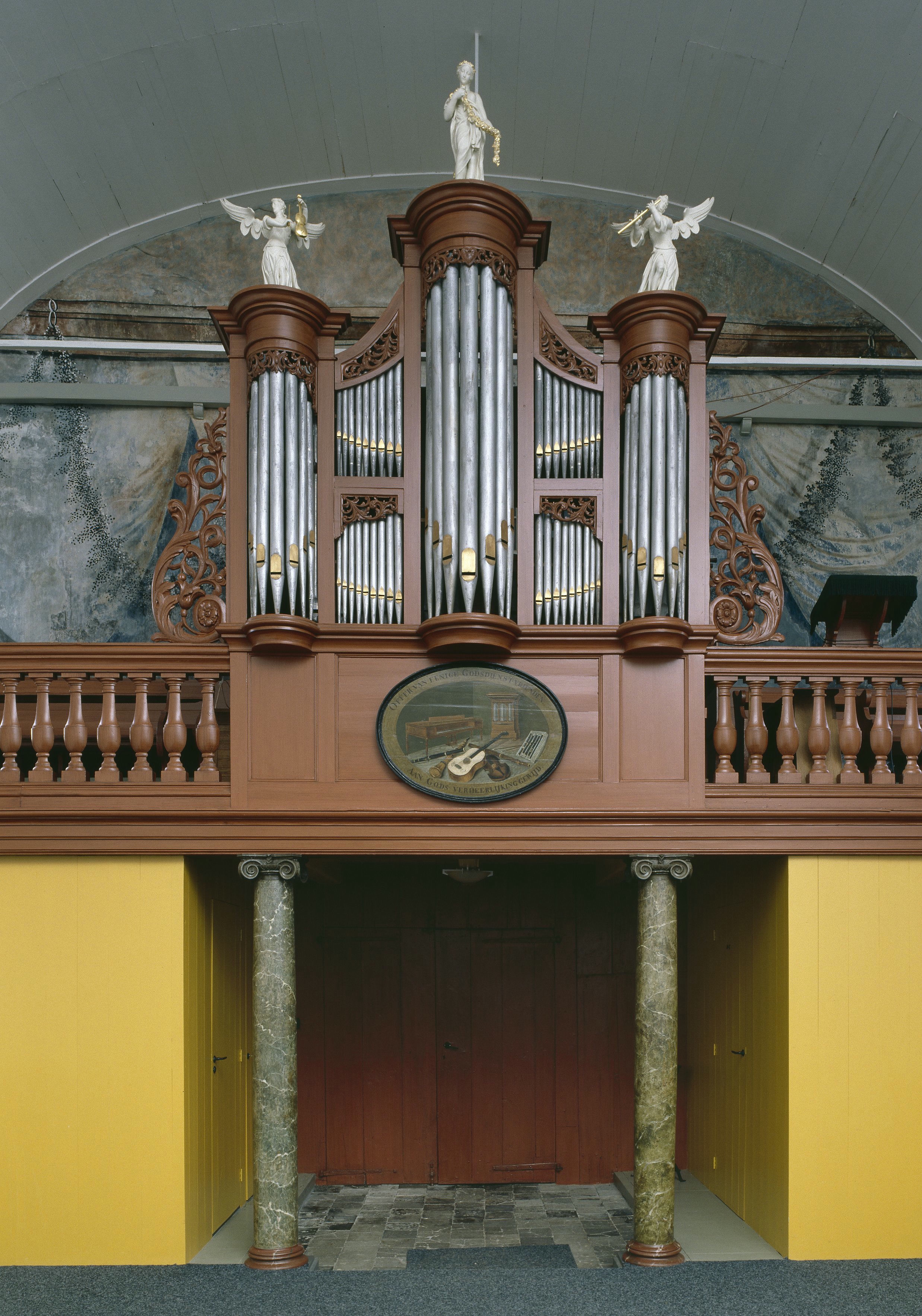 Hervormde Kerk: Interieur, aanzicht orgel, orgelnummer 724 (opmerking: Gefotografeerd voor Het Historische Orgel in Nederland 1894-1901, bladzijde 299)